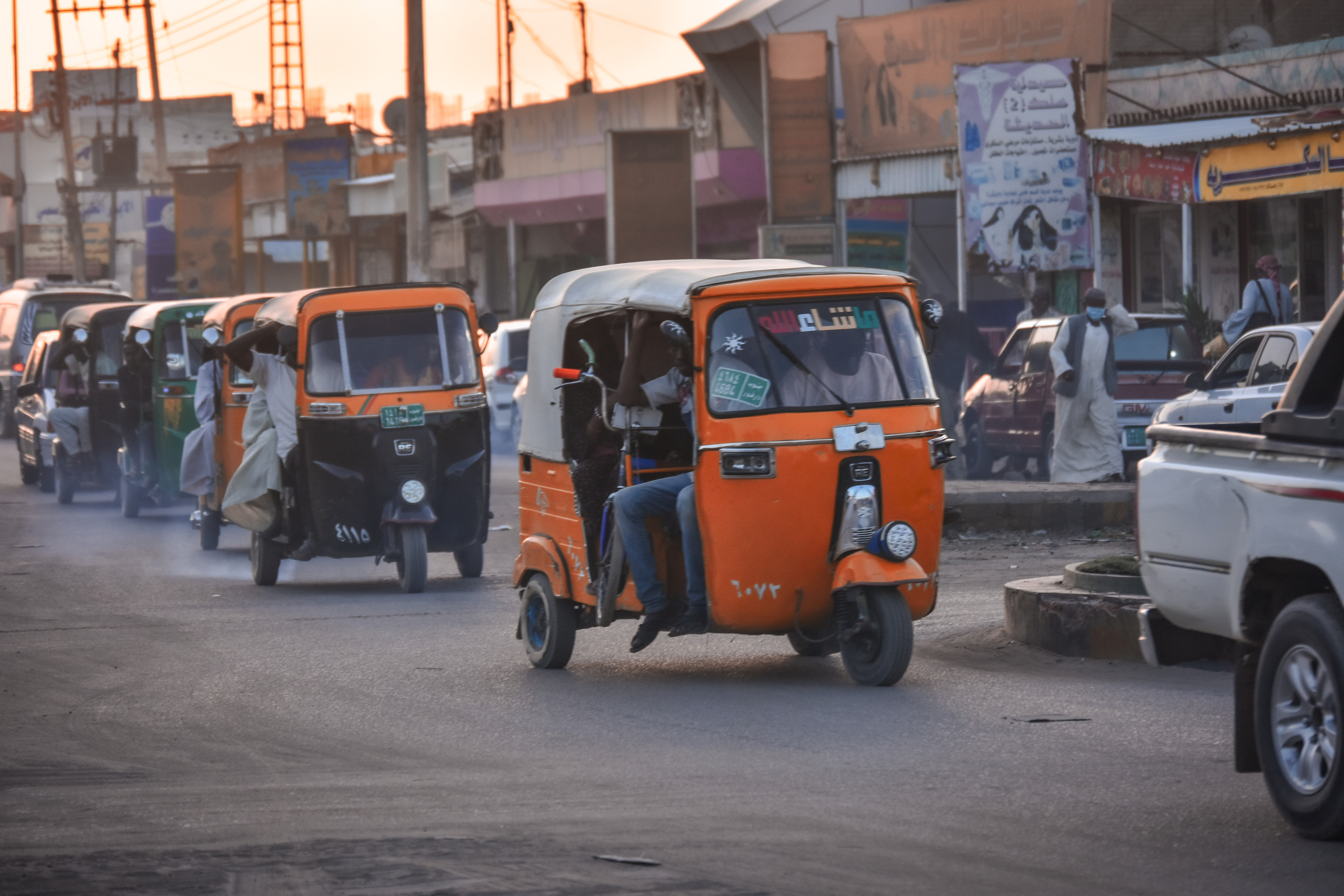 الصورة اخذت في نيالا صينية السينما مجموعة من الركشات يحملون ركاب متجهين سكة حديد This is an image with the theme "Africa on the Move or Transport" from: Sudan